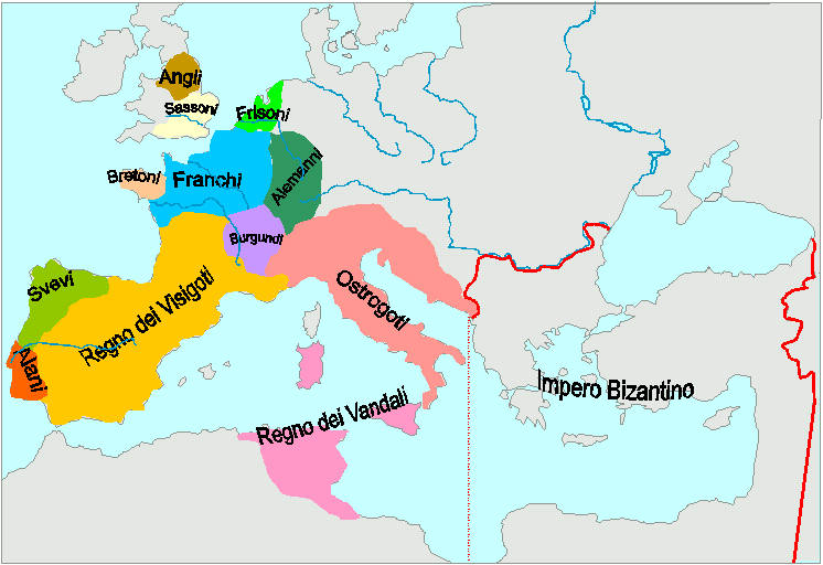 Romano-barbaric kingdoms at 476 d.C.